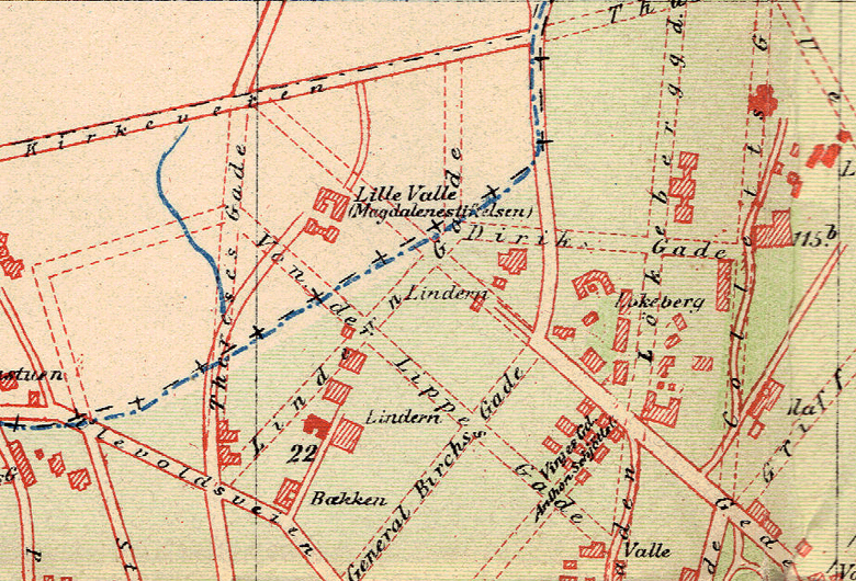 Lindern, Oslo.